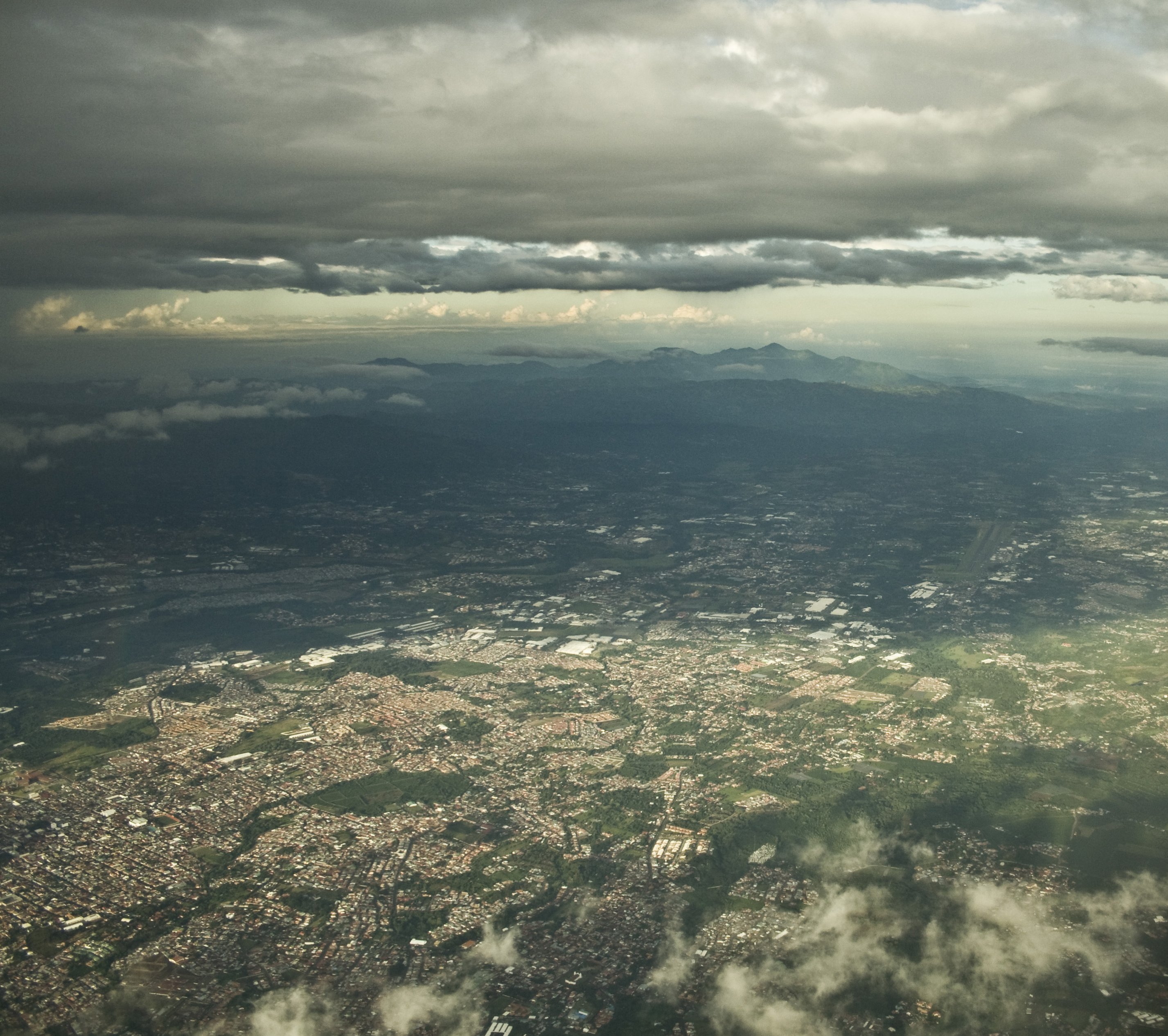 Gran Área Metropolitana de Costa Rica.